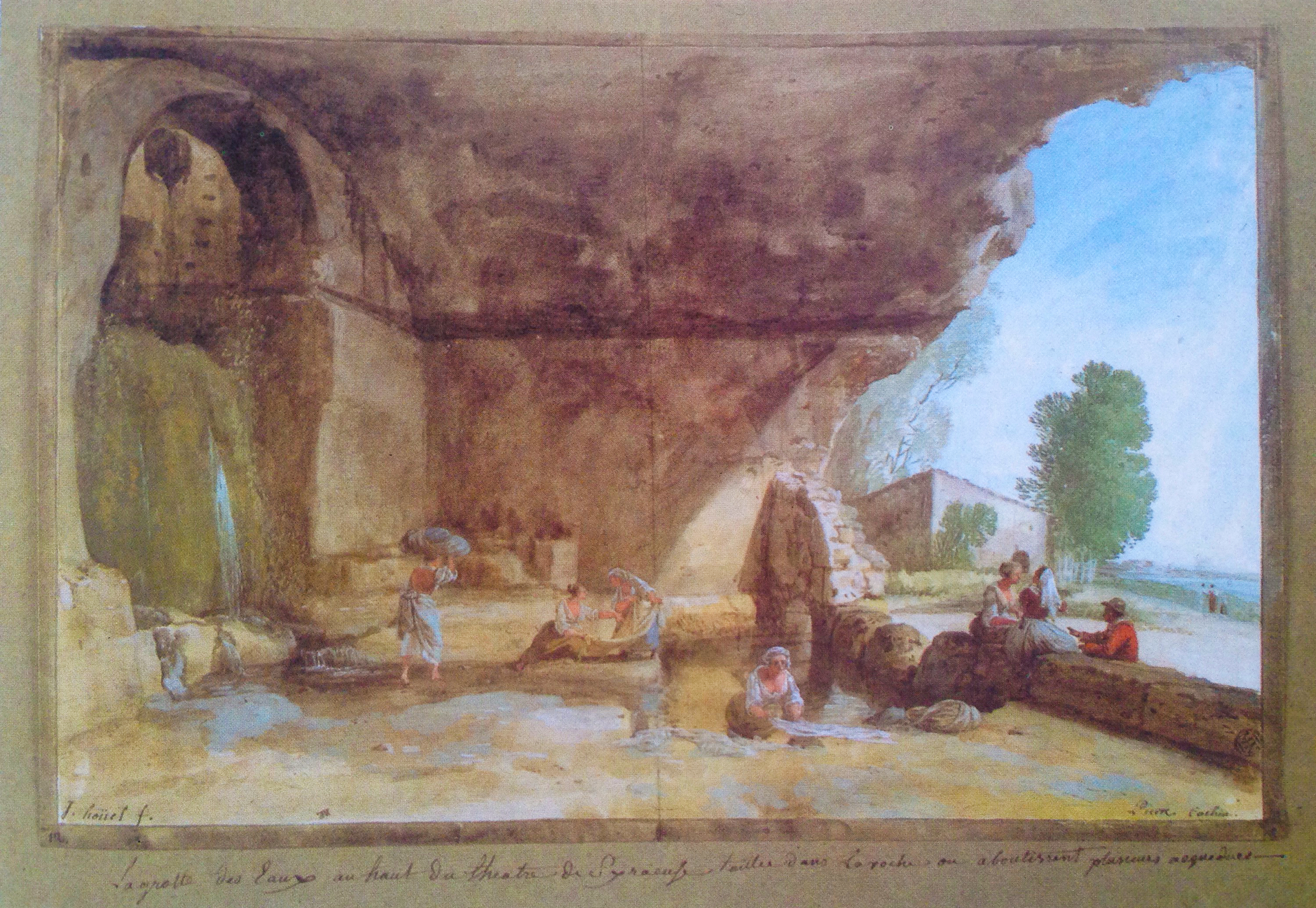 Jean Houel, La grotta delle acque scavata nella roccia, nella parte alta del teatro di Siracusa, dove confluiscono diversi acquedotti. Guazza (non presente nel Voyage)